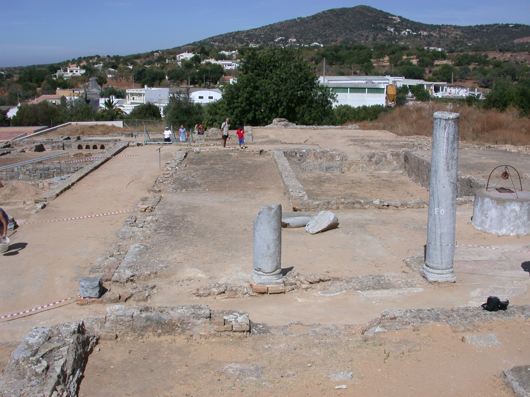 Wohnalage A von Osten